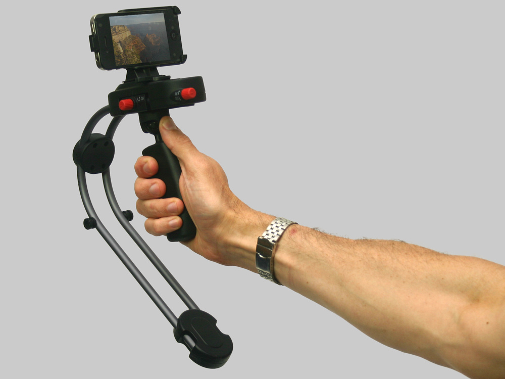 Estabilitzador de càmera per a telèfon mòbil.